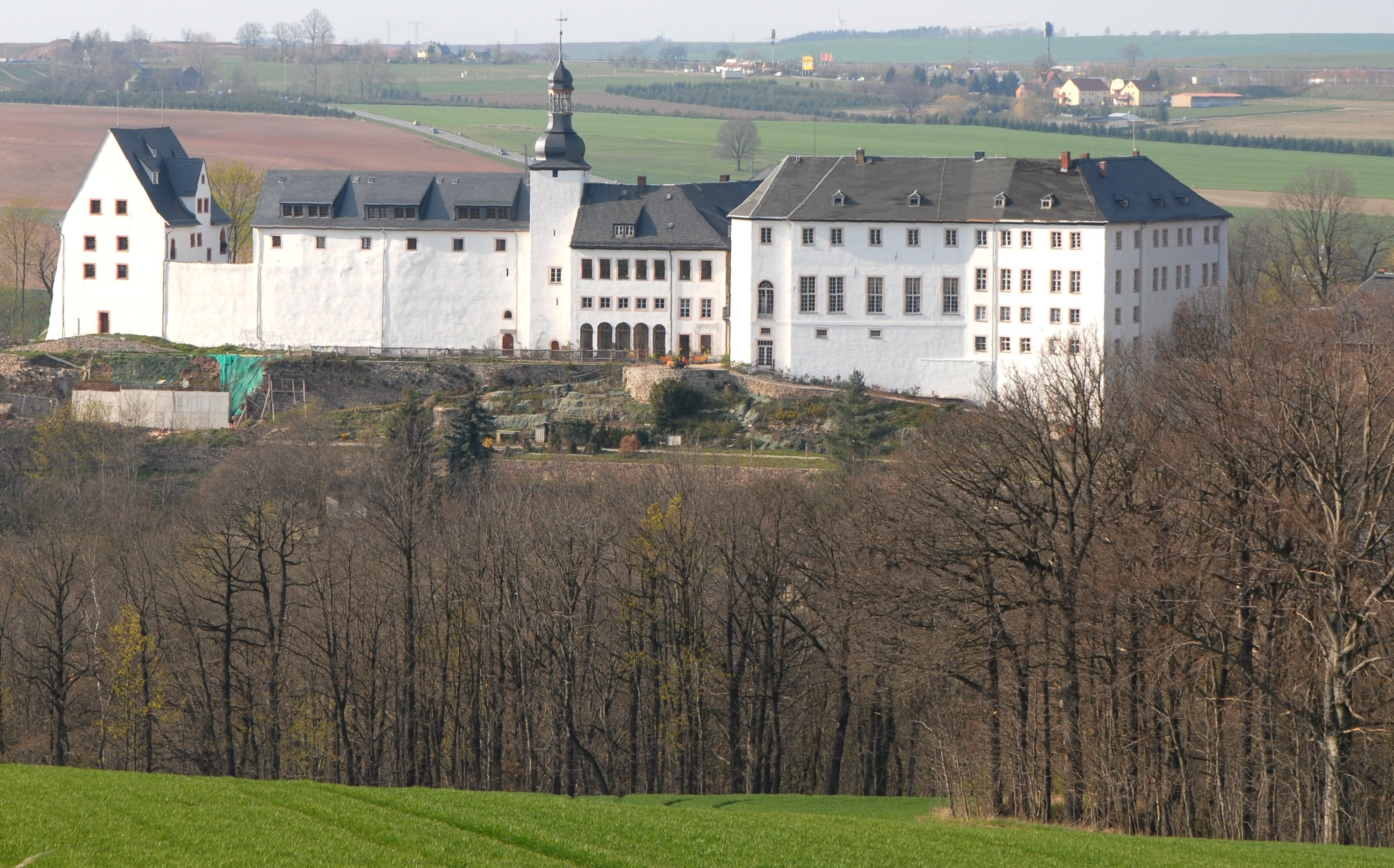 Schloss Wildenfels, Südansicht